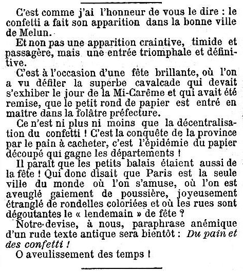 page 1, 3ème colonne.